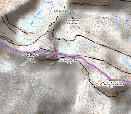 carte réalisée sur umap This map may be incomplete, and may contain errors. Don't rely solely on it for navigation.